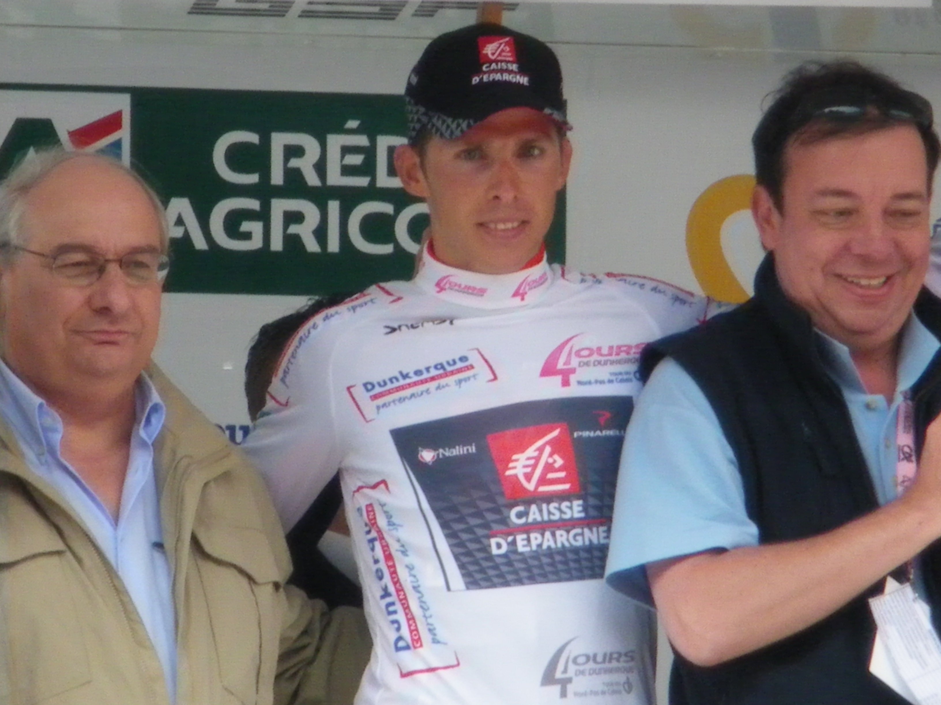 Le vainqueur Rui Costa des 4 jours de Dunkerque en compagnie du maire de la ville Michel Delebarre (à gauche) et du maire de Saint Pol Sur Mer Christian Hutin (à droite)